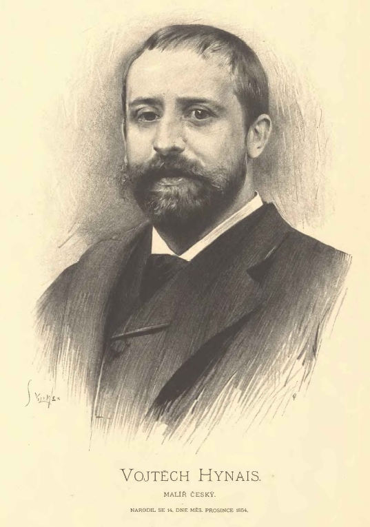 Portréty českých osobností od Jana Vilímka